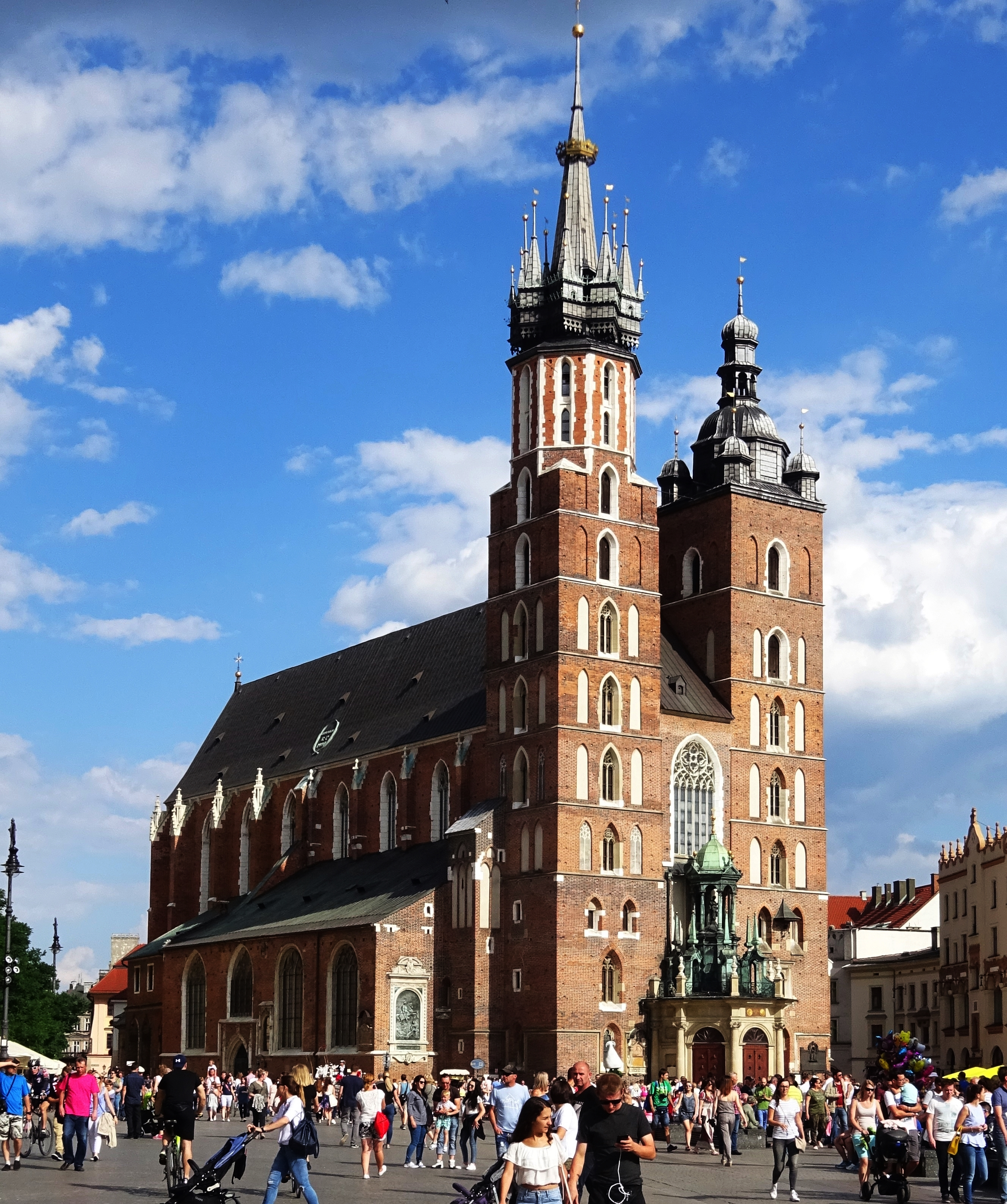 Kościół Mariacki w Krakowie. Widok od zachodu (linii A-B Rynku Głównego). 2017